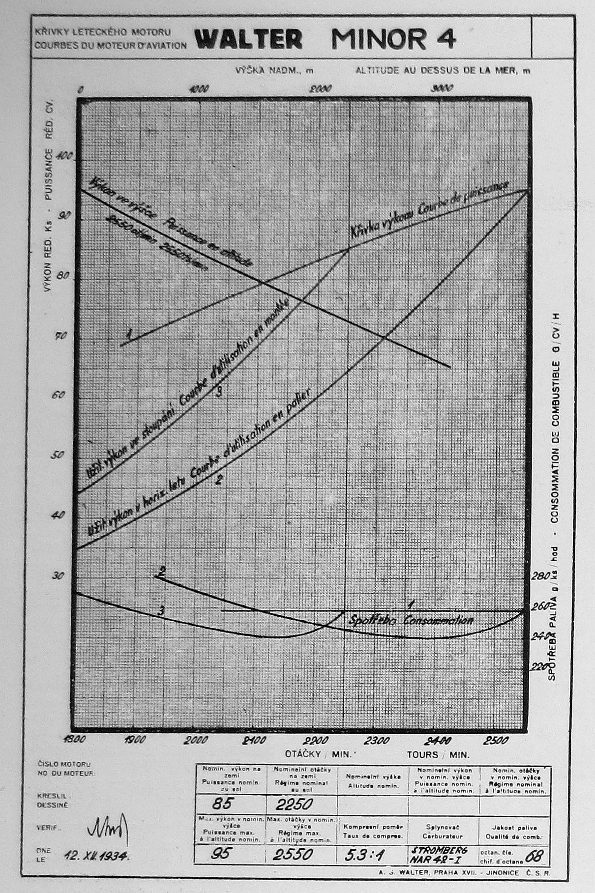 letecký motor Walter Minor 4 (1936), charakteristiky